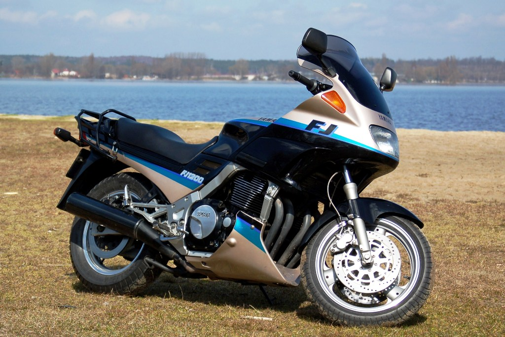 Zdjecie motocykla yamaha fj1200